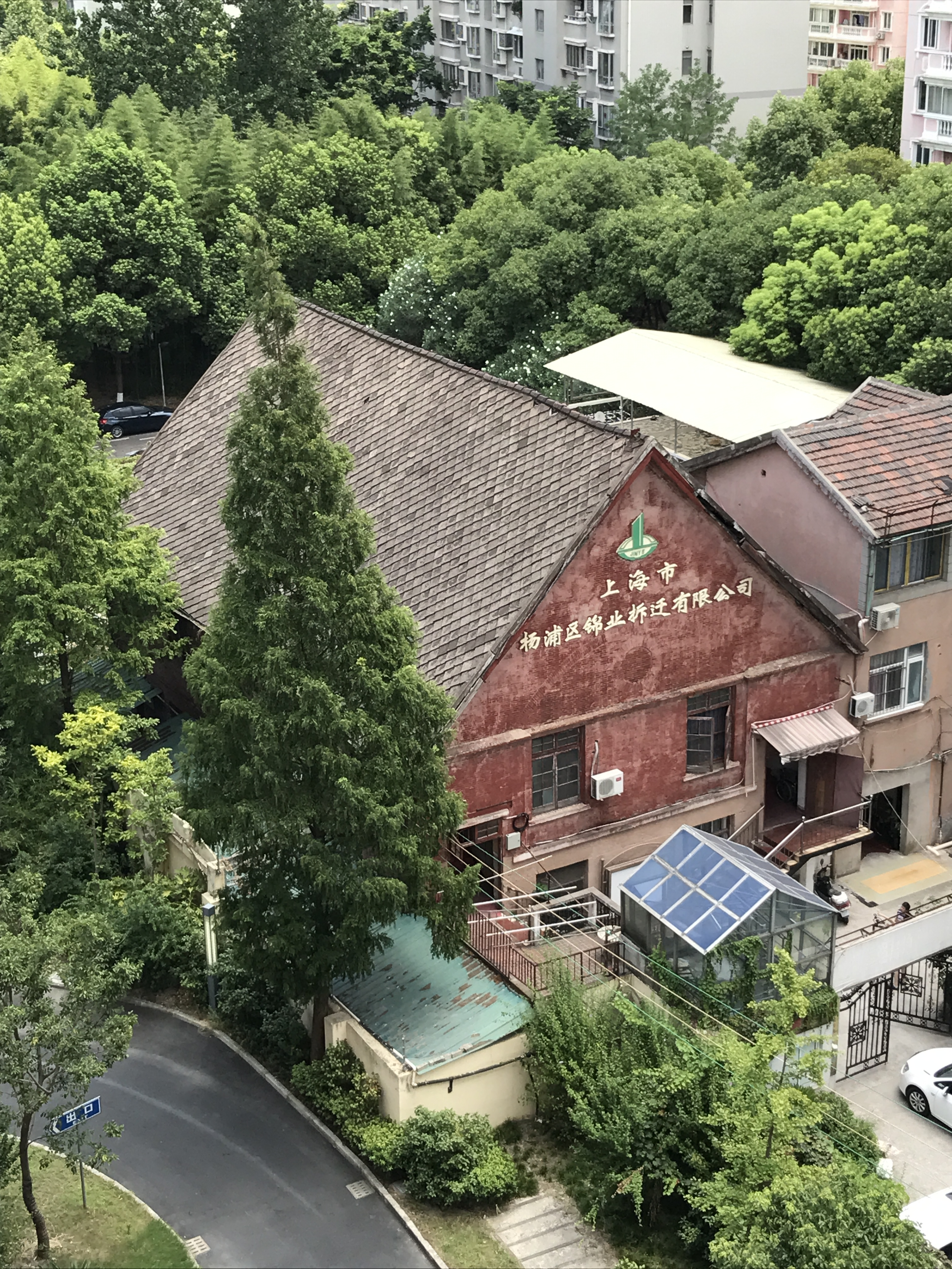 基督复临安息日会遗址 宁国路458弄51号